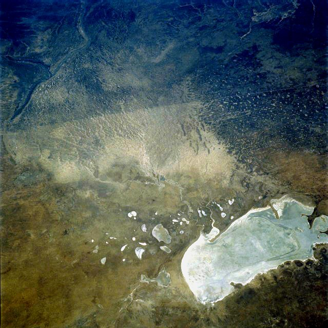 Etosha Pan, Namibia - June 1985